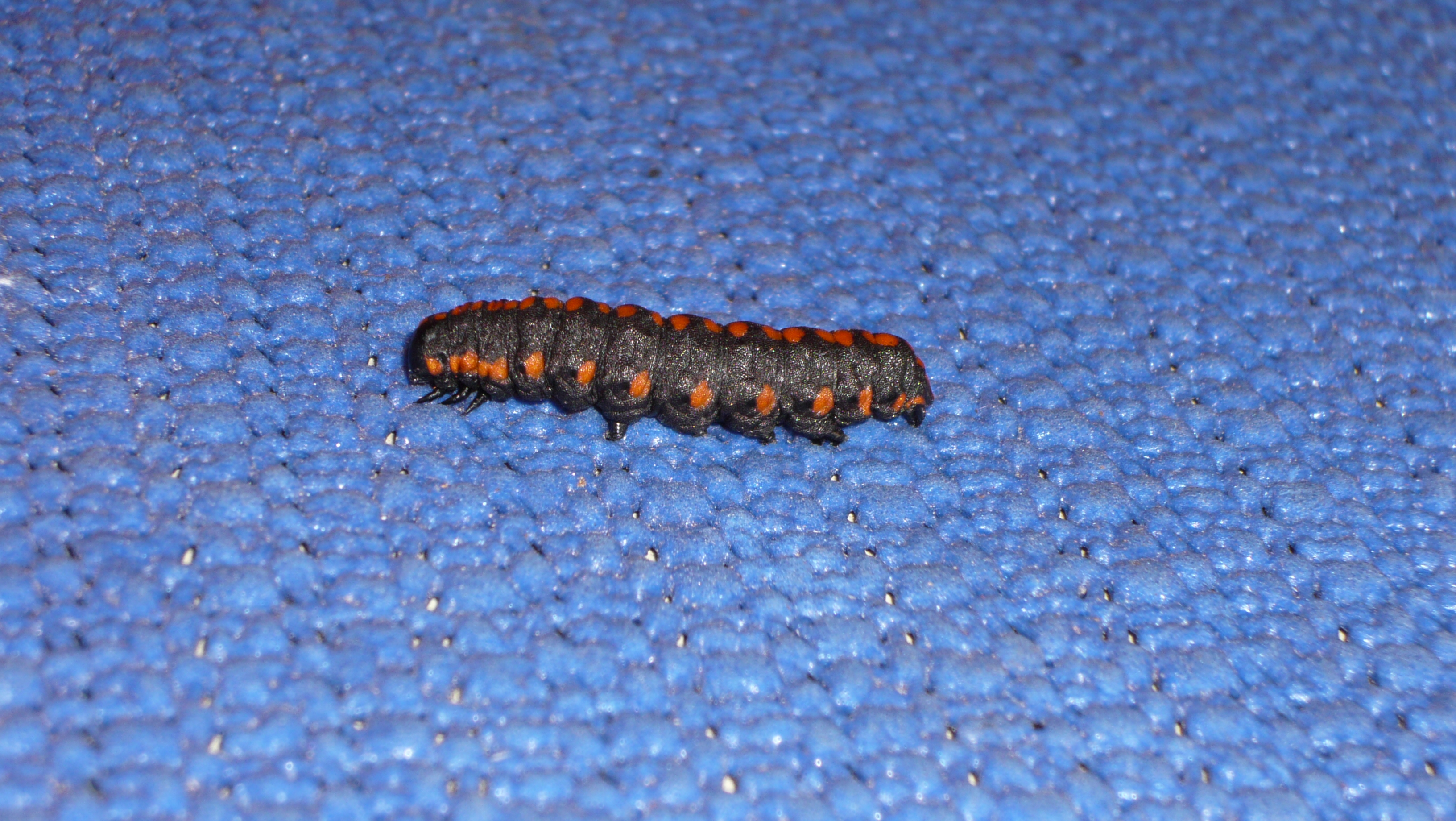 Cucullia lucifuga larva